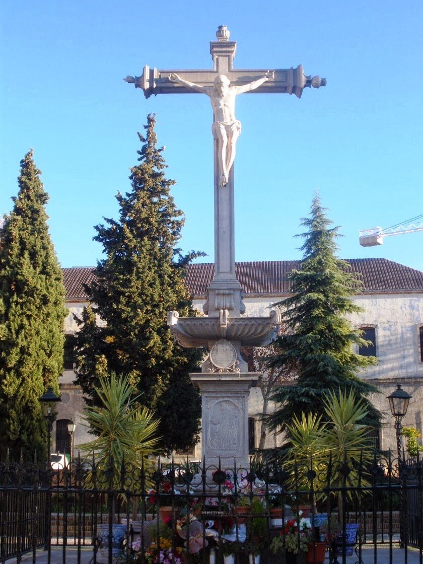 Monument of the Cristo Of Favors located in the Campo del Príncipe of Granada